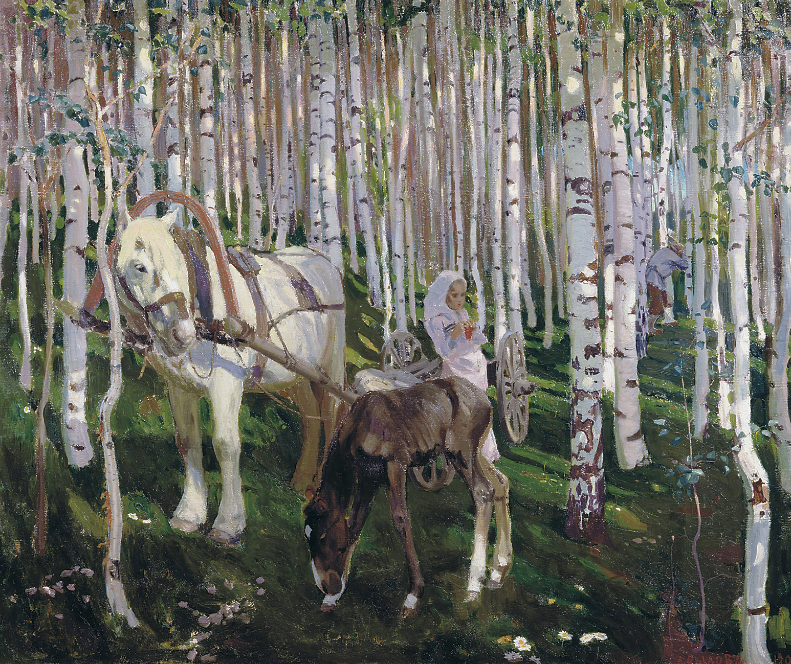 Аркадий РЫЛОВ (1870-1939). В лесу. 1905. Холст, масло. In the Forrest, 1905 Oil on Canvas